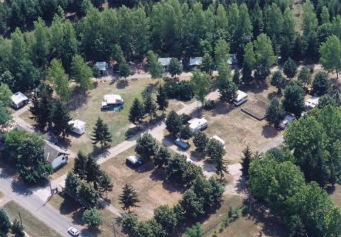 Mezőkovácsháza, Hungary, aerialphotography